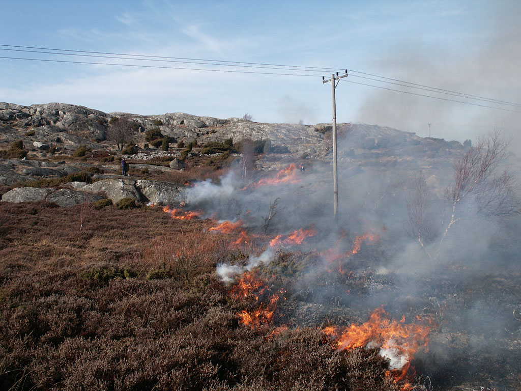 Ljungbränning på Galterö Heather burning on Galterö, west Sweden